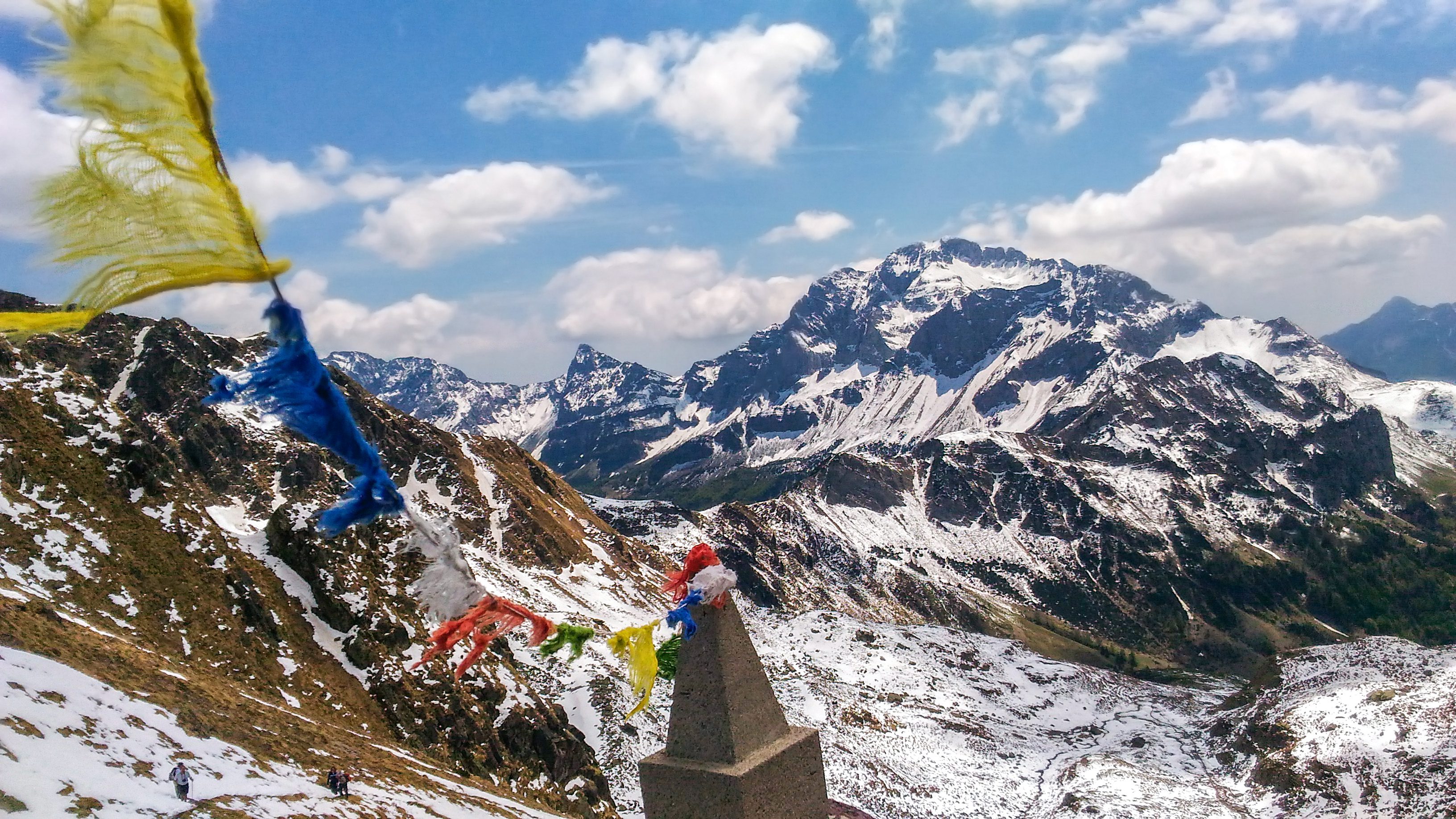 Foto scattata con dispositivo cellulare dal Passo di Mezzeno,ritrae il monte Arera innevato (Val Brembana)